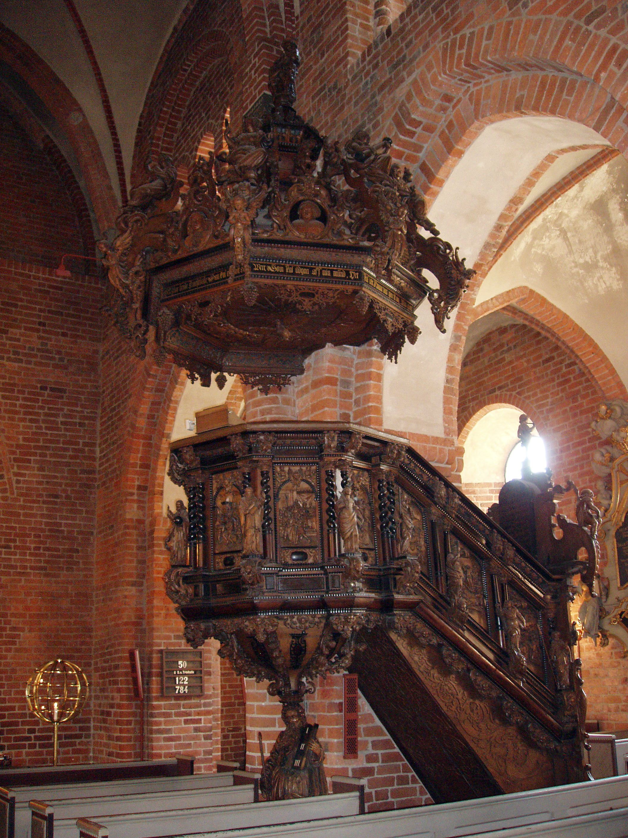 Prædikestolen Vor Frelser Kirke Horsens